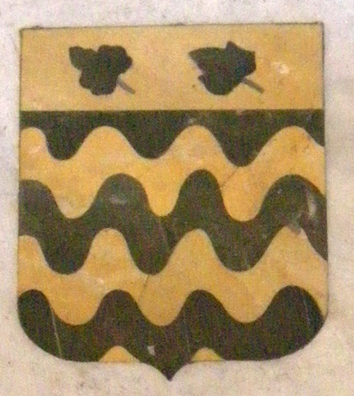 San marco, firenze, stemma pavimento 05 stemma lapi